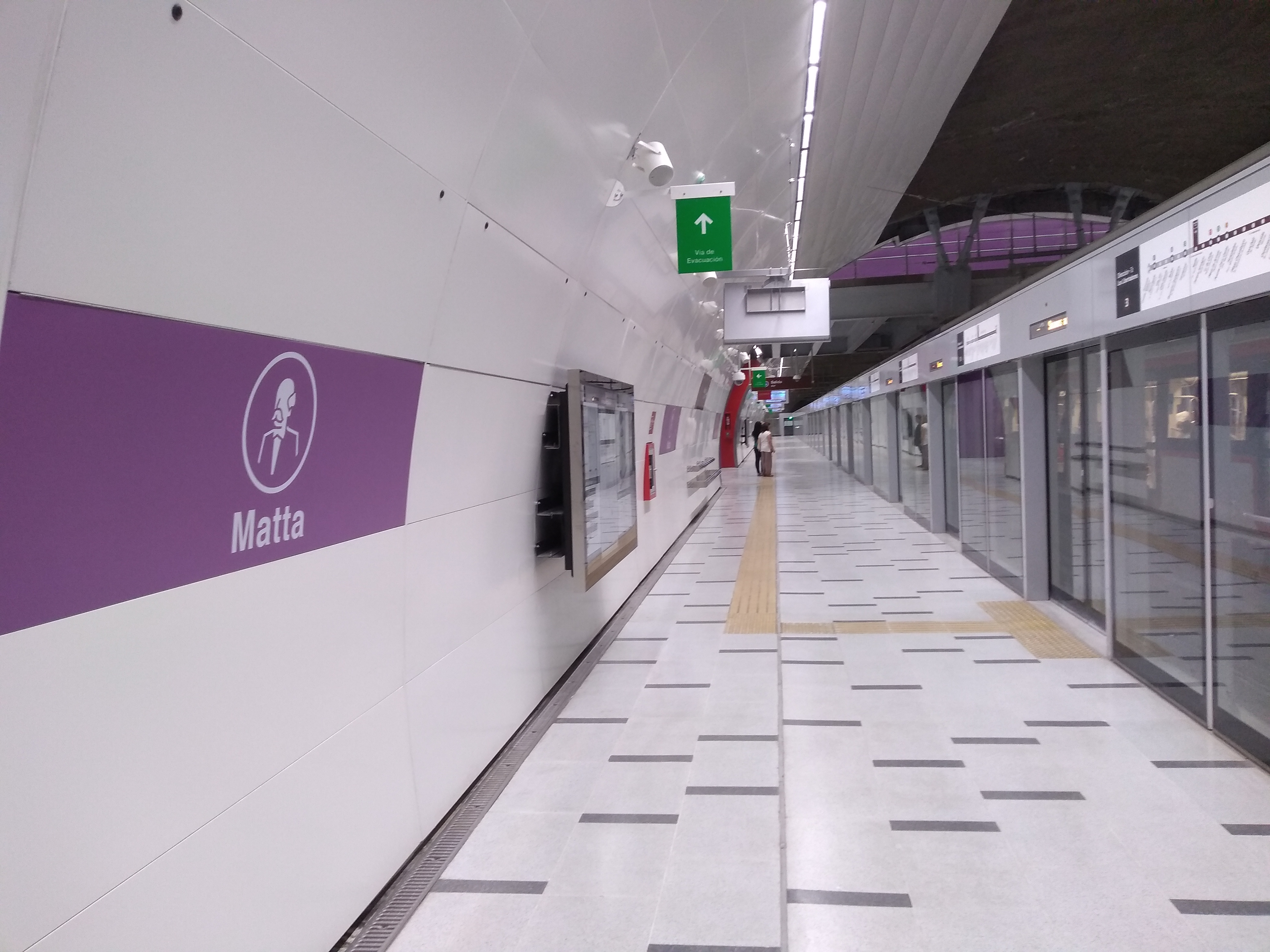 Estación Matta